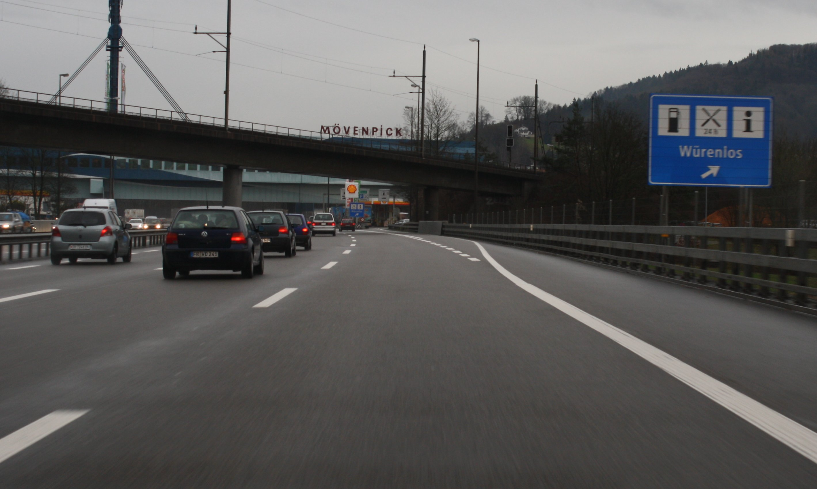 Autobahnausfahrt Würenlost